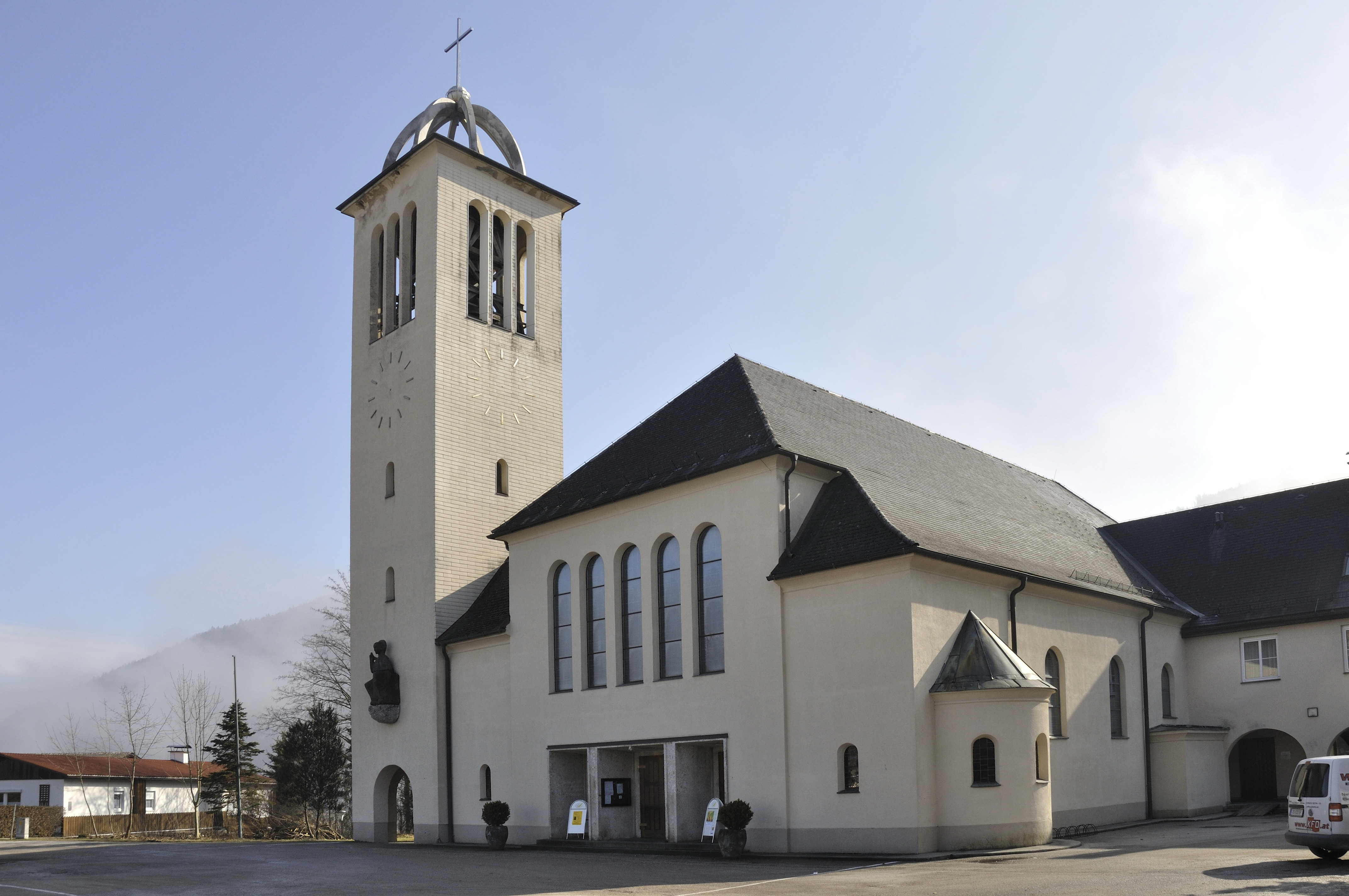 Kath. Pfarrkirche, Bertholdkirche